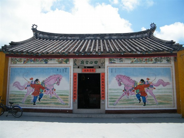 达濠青篮田心宫，始建于明崇祯五年，1985年重修。2009.7.31